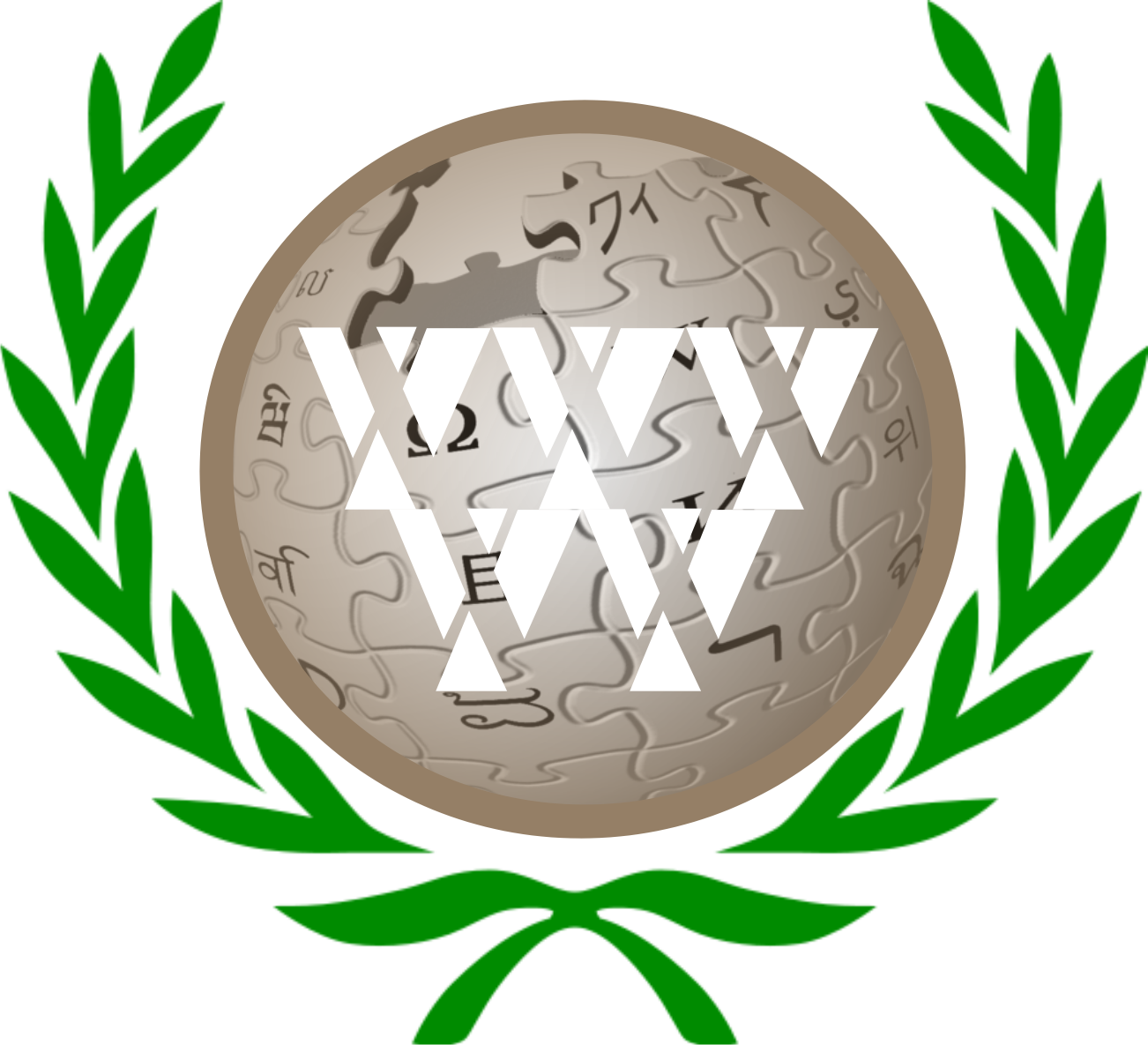 Medalla de Bronce de las Wikiolimpiadas